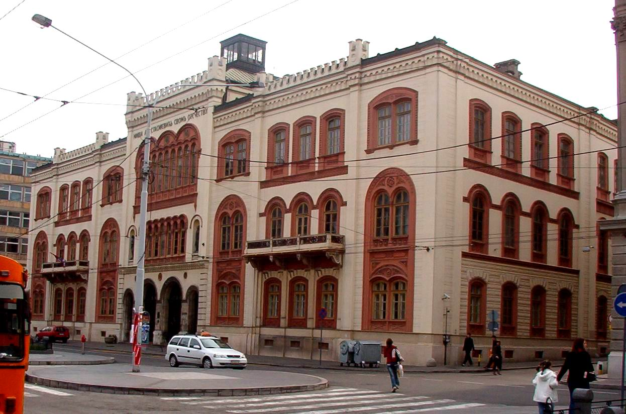 Капетан Мишино здање, у Београду